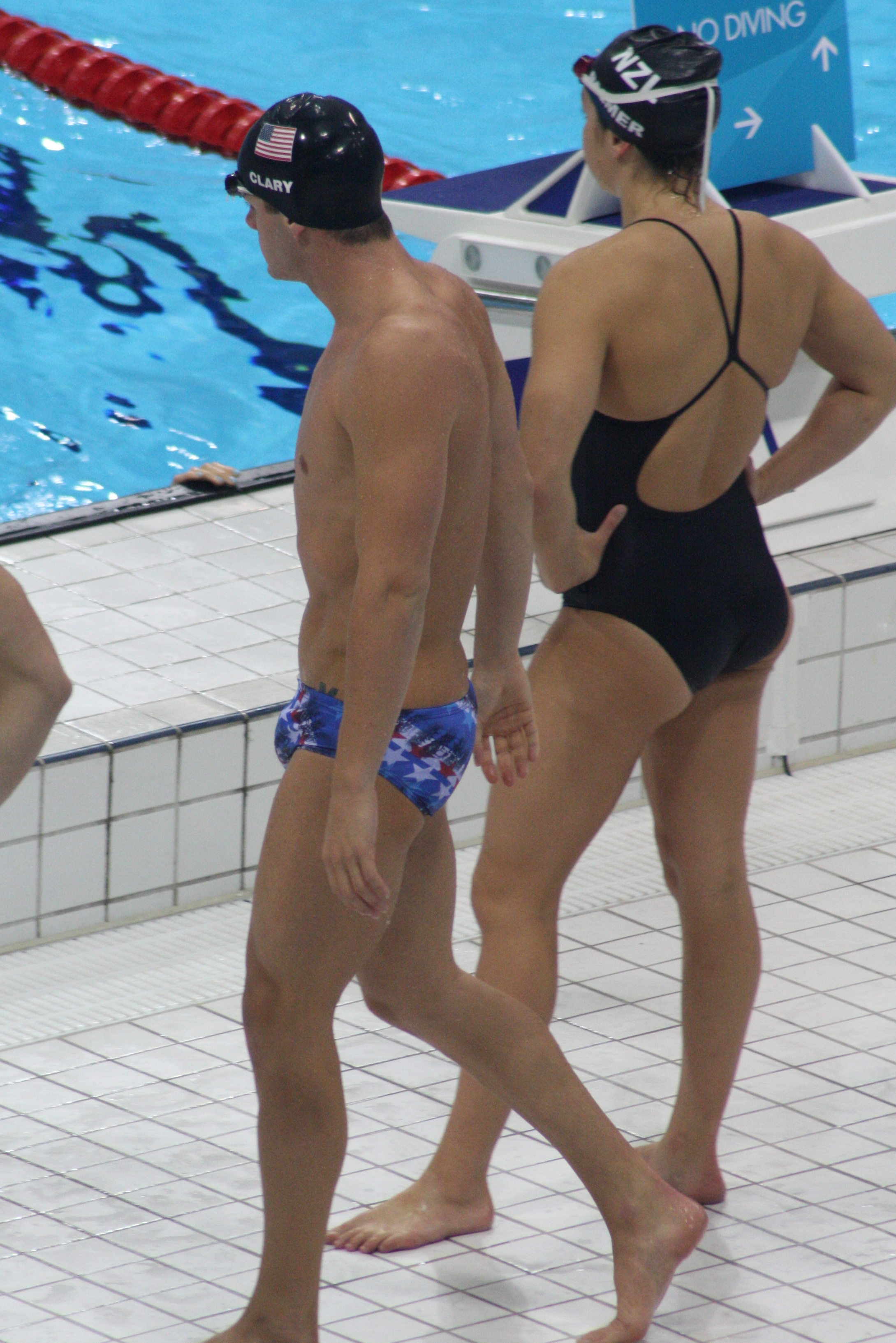 Tyler Clary